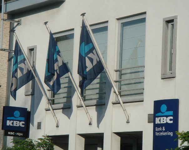 zelf, CC-BY-SA (be) KBC-bankkantoor in Wakken MADe 19 nov 2005 16:01 (CET)